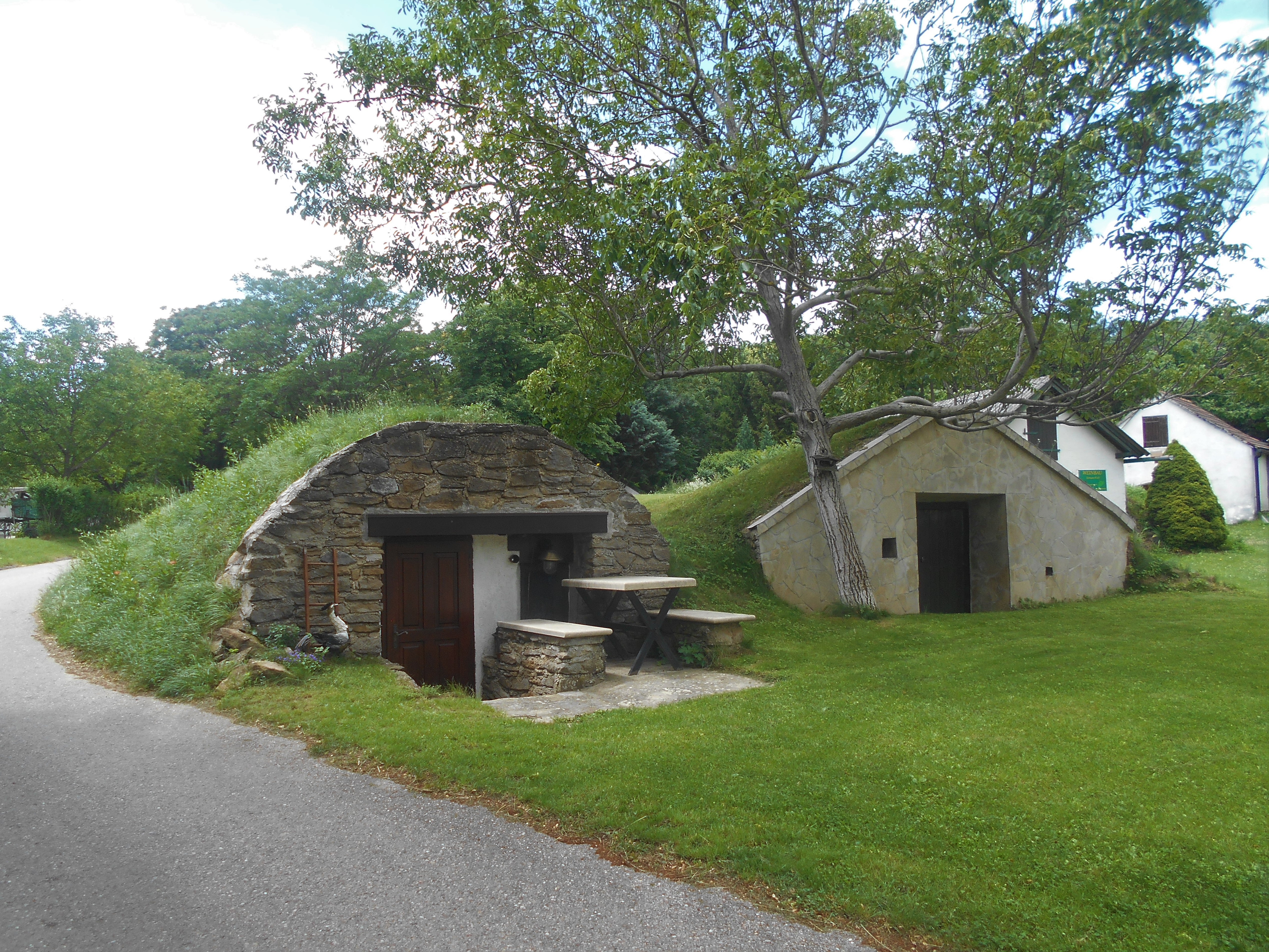 Kellergasse Kellerviertel Edelstal in Edelstal